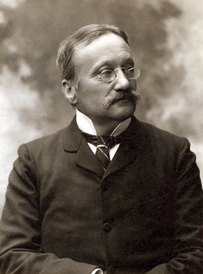 Ritratto fotografico di Arrigo Boito (ultimo decennio del XIX secolo).